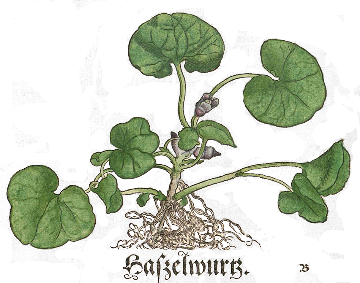 Abbildung der Haselwurtz